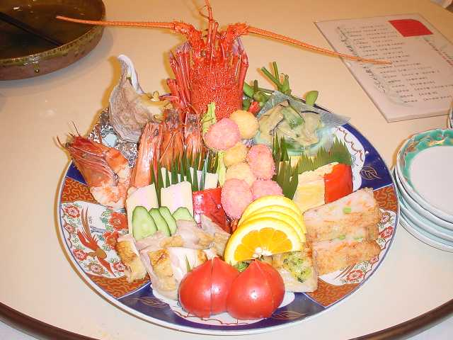 ホテルで出された皿鉢料理（2005年5月投稿者が撮影）